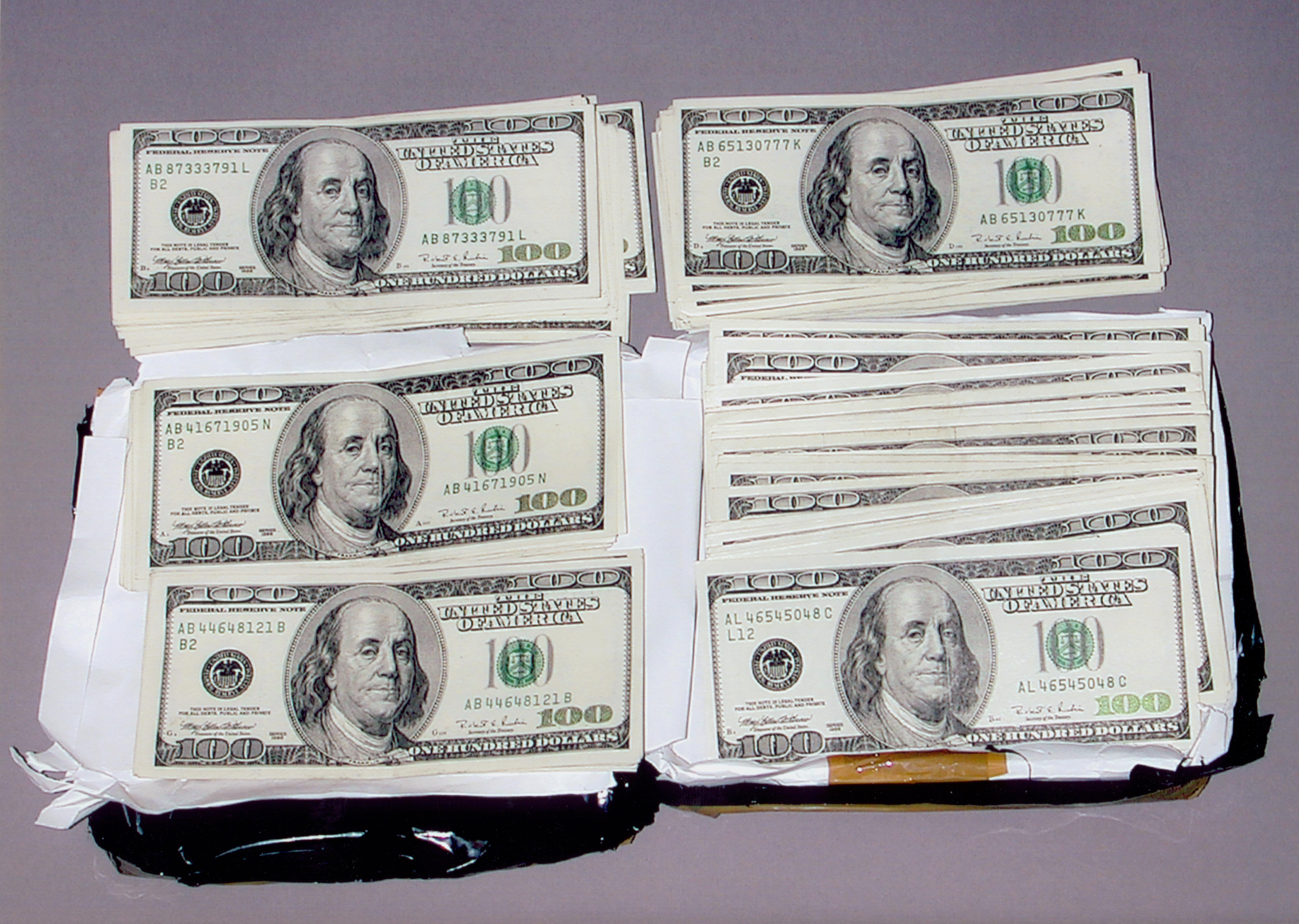 Pieniądze zostawione przez agenta SVR dla R. Hanssena